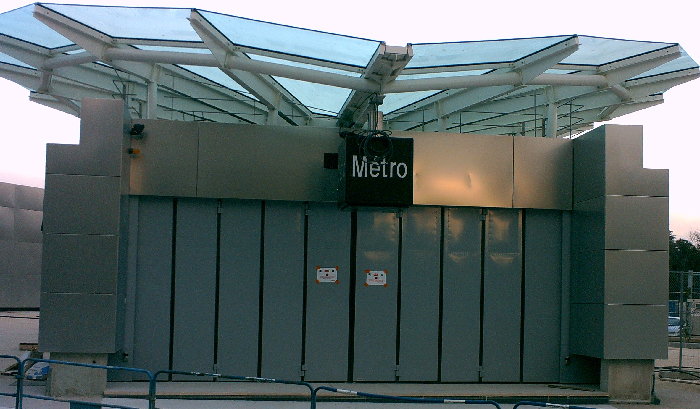 Édicule de la station Louis Armand en travaux.